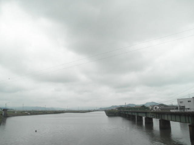 徳島県小松島市田野町赤石南 芝生川